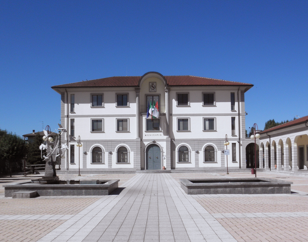 Municipio di Massalengo